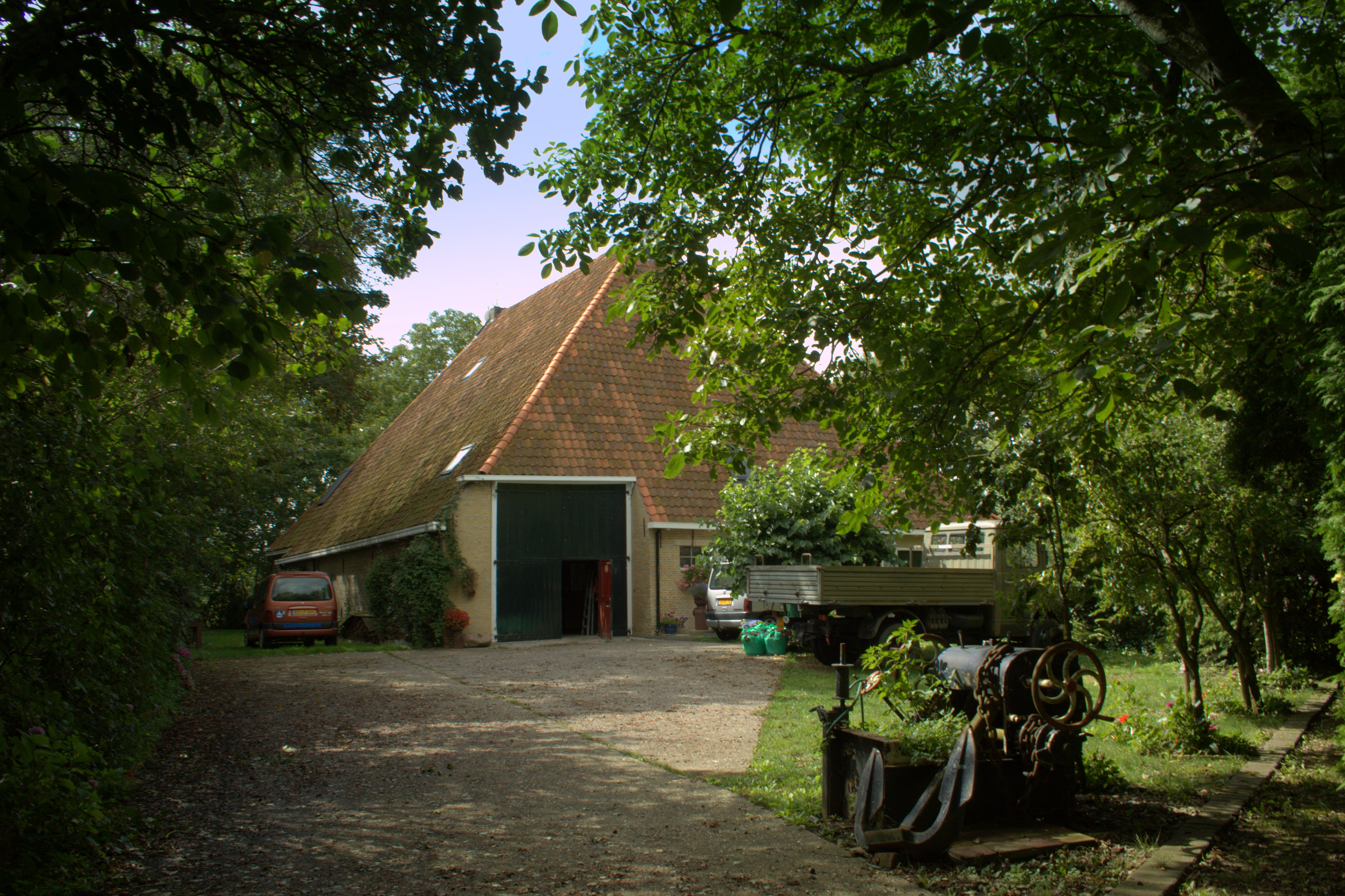 Boerderij" Great Tsarerd' in het buurtschap Tjaard ten zuiden van Wirdum